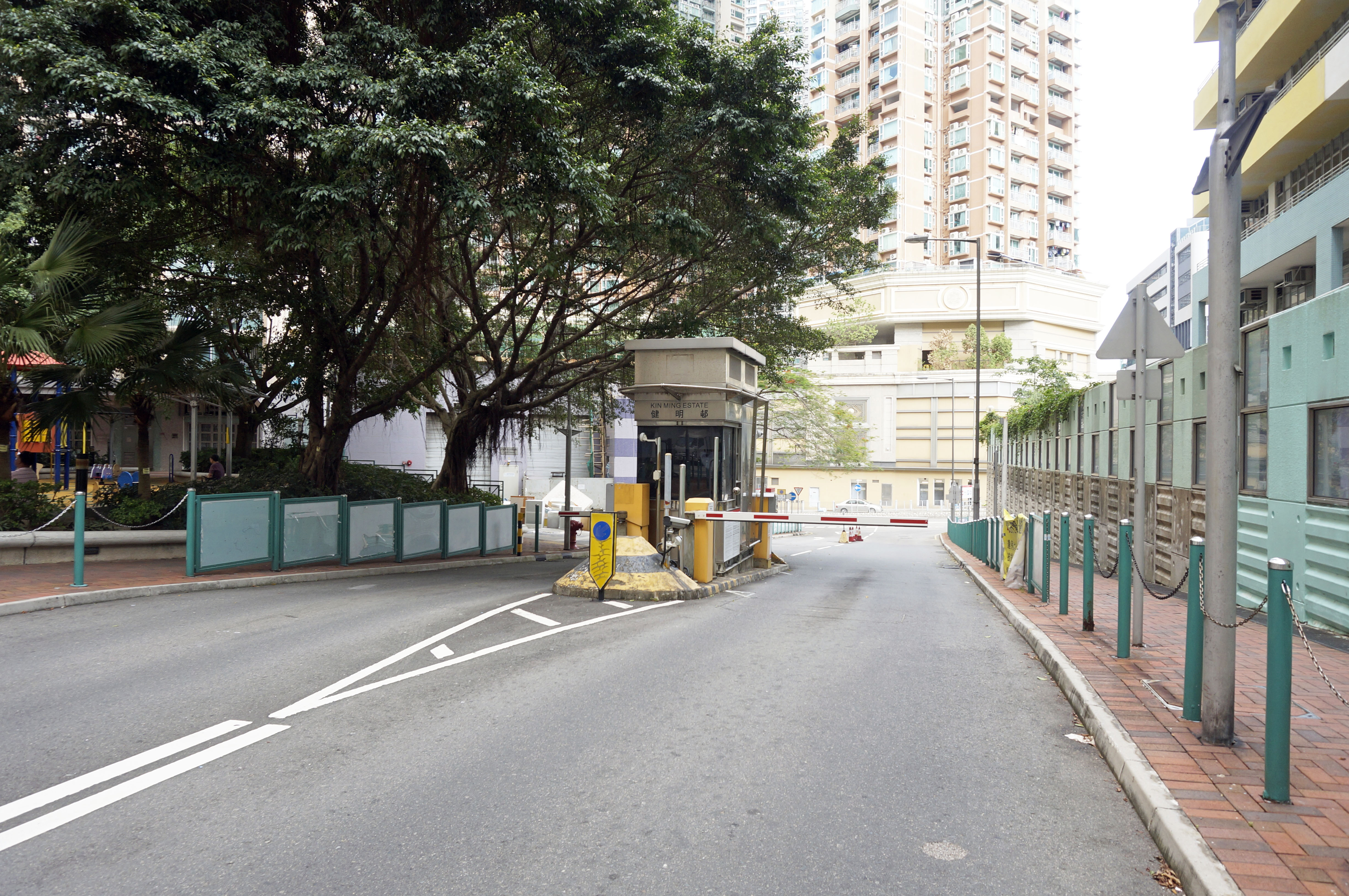 調景嶺嶺光街西段部分